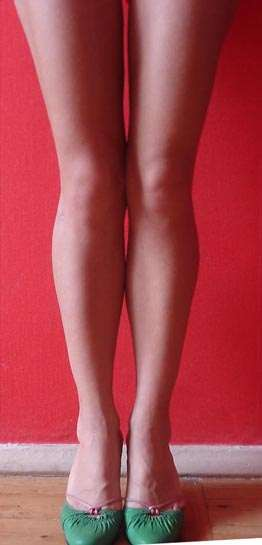 те же голения через полгода после операции